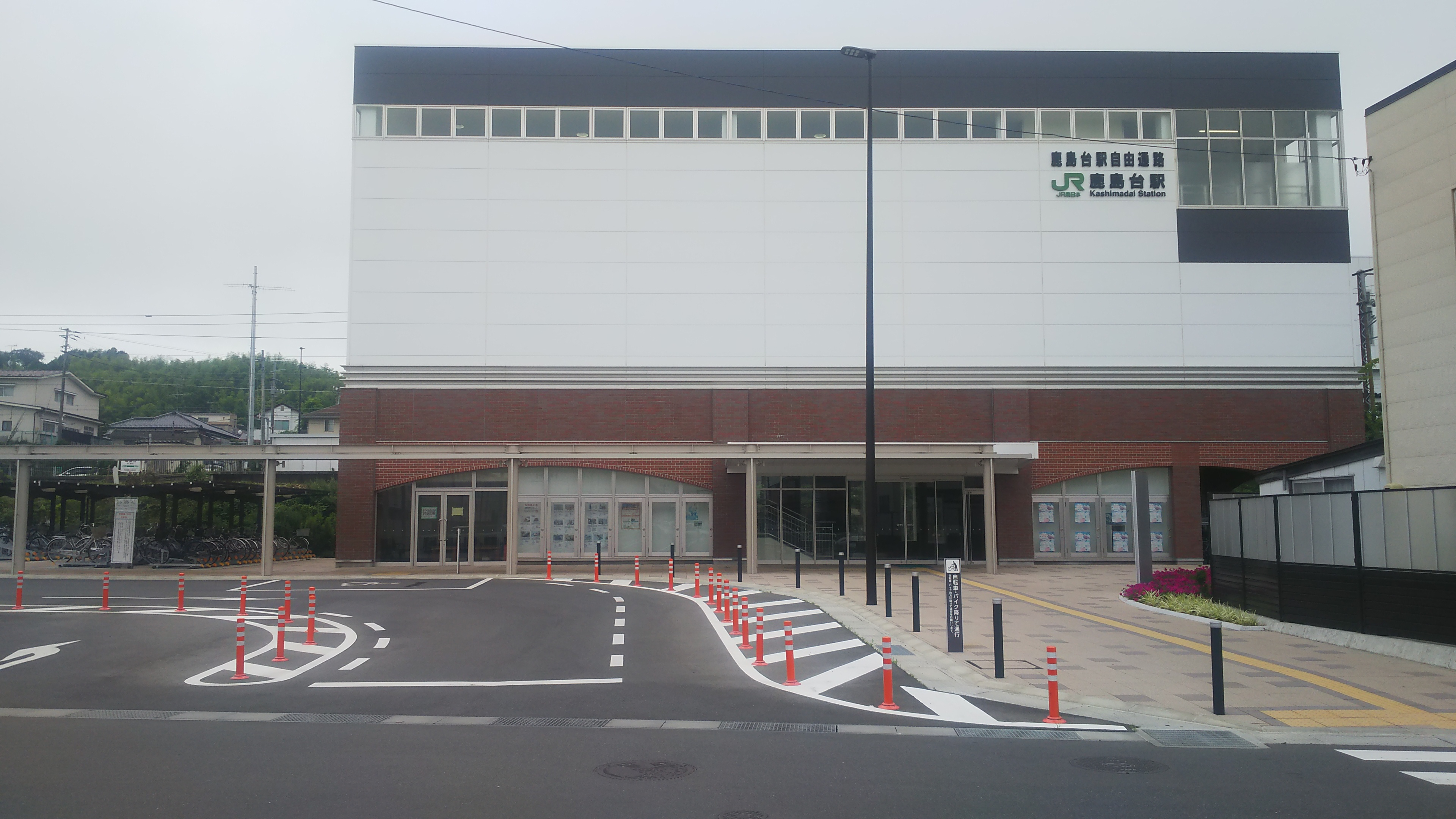 鹿島台駅駅舎東口